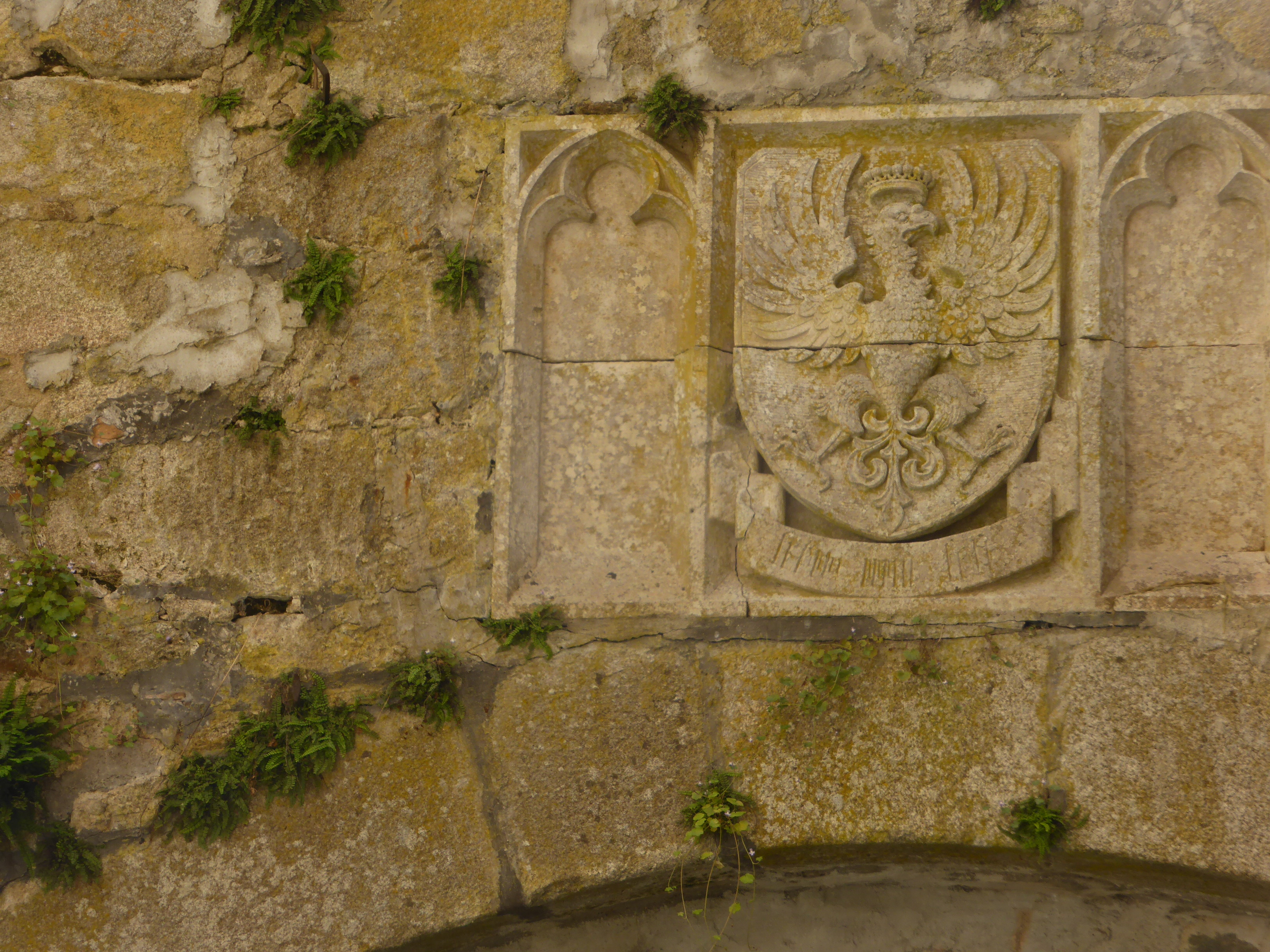 Schloss Egg (Wappen auf Brücke)